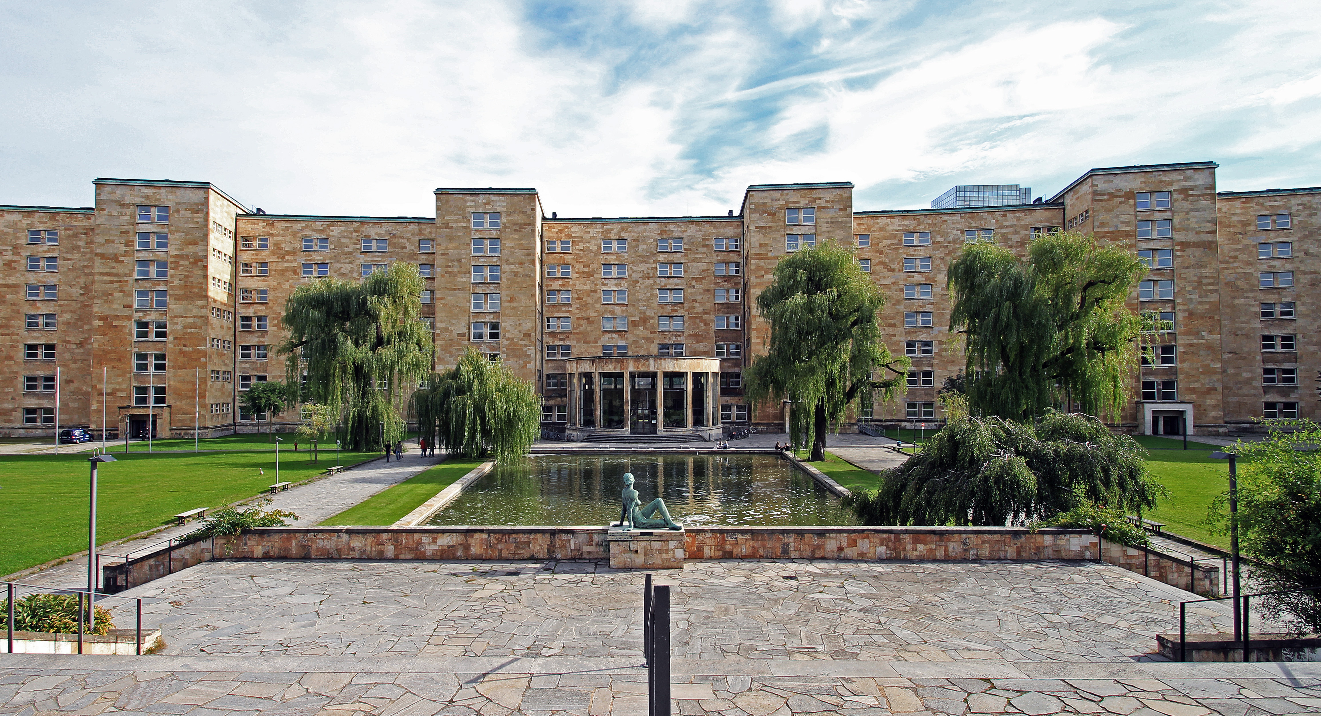 Rückseite des IG-Farben-Hauses in Frankfurt